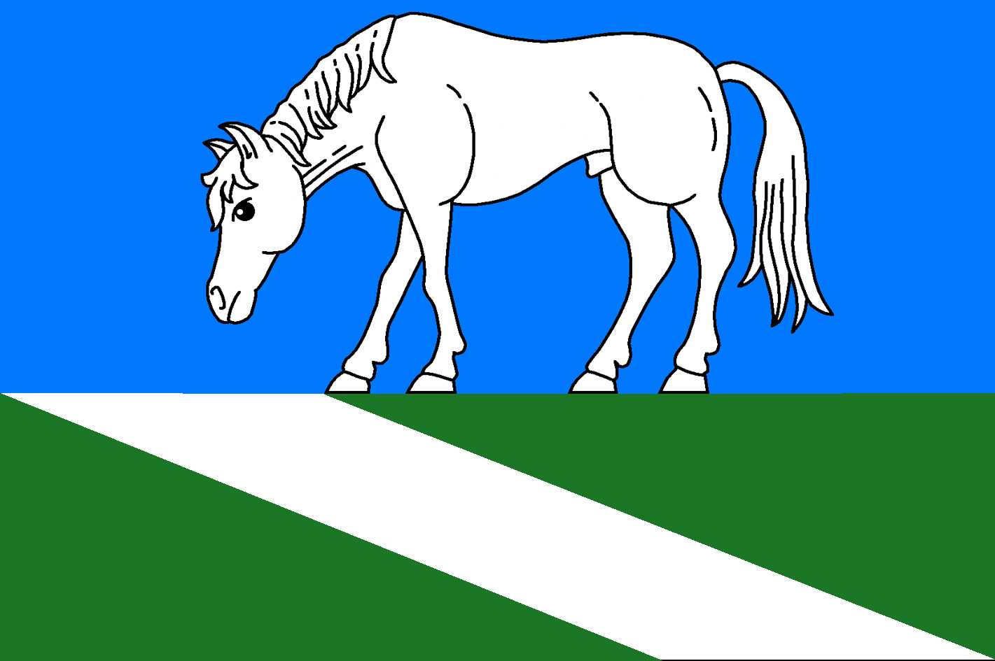 List tvoří dva vodorovné pruhy, modrý a zelený, v poměru 3 : 2. Na horním okraji zeleného pruhu stojí bílý kůň se skloněnou hlavou. Z první třetiny horního okraje zeleného pruhu vychází kosmý bílý pruh do třetí třetiny dolního okraje listu. Vlajka opakuje podobu znaku.